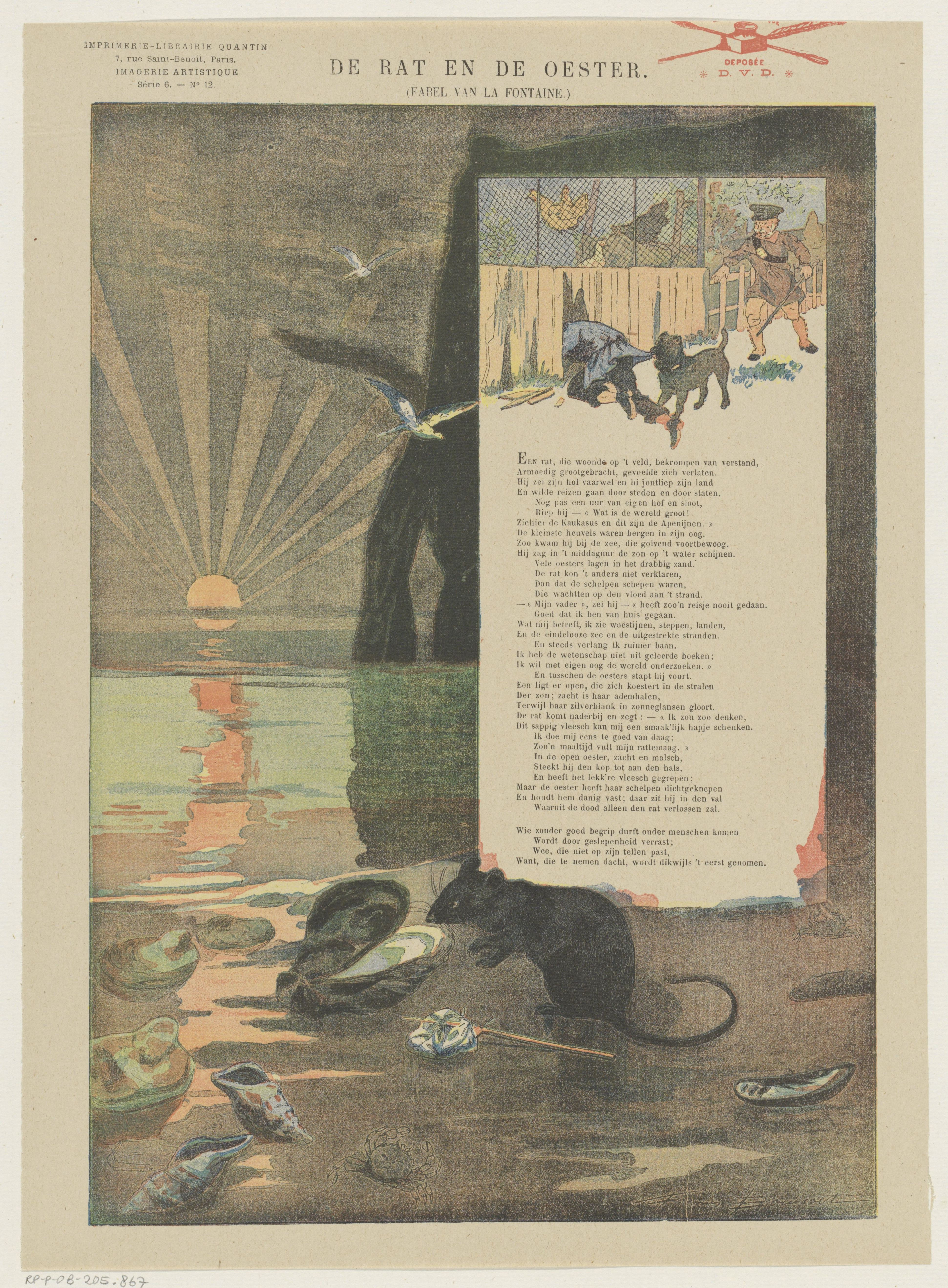 IdentificatieTitel(s): De rat en de oester (titel op object)Fabel van La Fontaine (serietitel op object)Imagerie Artistique / Série 6 (serietitel op object)Objecttype: prent volksprent Serienummer: 12/20Objectnummer: RP-P-OB-205.867Opschriften / Merken: verzamelaarsmerk, verso, gestempeld: Lugt 2760octrooivermelding, recto rechtsboven, gestempeld: ‘marque de fabrique / deposée / * D.V.D. *’, rode stempel met inktpot, pen en schrijfveerOmschrijving: Blad met een grote voorstelling uit de fabel van Jean de La Fontaine, van de rat en de oester. Rechtsboven een tekstblok met een vers. Genummerd linksboven: Série 6. - No. 12.VervaardigingVervaardiger: ontwerper: Firmin Bouisset (vermeld op object)prentmaker: anoniemuitgever: Albert Quantin (vermeld op object)Plaats vervaardiging: ParijsDatering: 1876 - 1890 en/of 1888Fysieke kenmerken: kleurenlithografie en tekst in boekdrukMateriaal: papier Techniek: kleurenlithografie (procedé) / boekdrukAfmetingen: blad: h 366 mm × b 268 mmOnderwerpWat: fabelsrodents: ratmolluscs: oysterVerwerving en rechtenCredit line: Schenking van de heer F.G. Waller, AmsterdamVerwerving: schenking 1923Copyright: Publiek domein